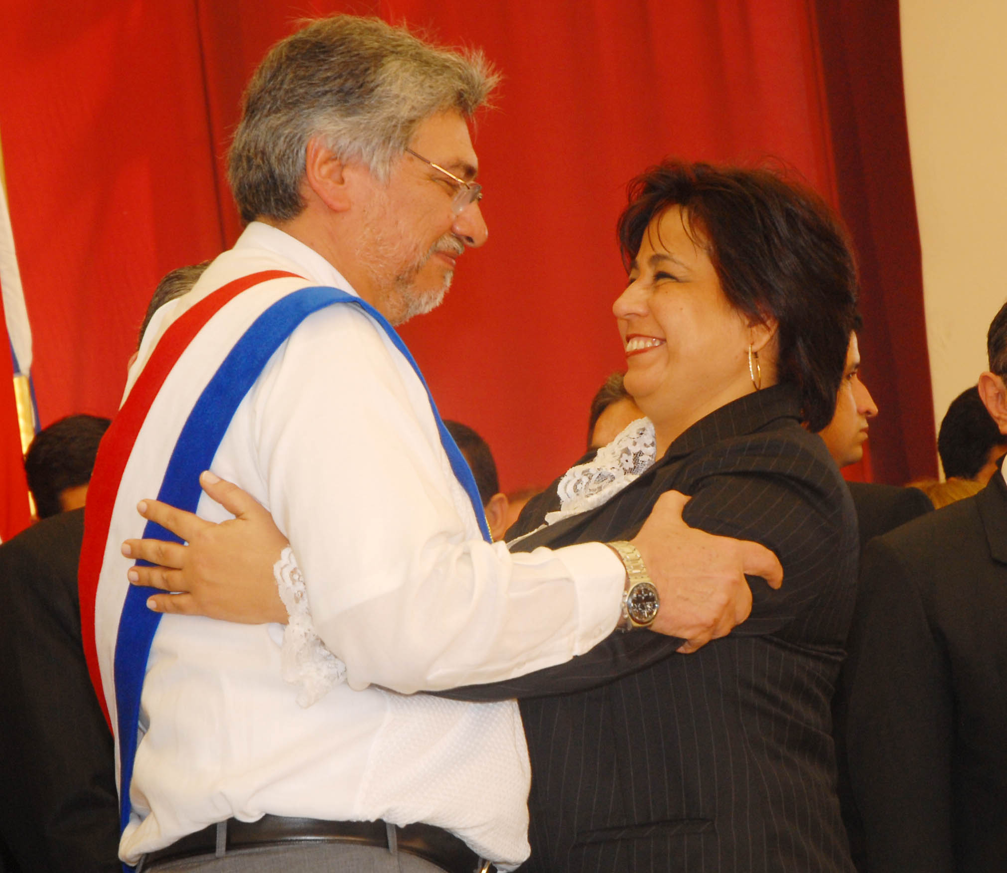 Esperanza Martínez y el entonces presidente Fernando Lugo en el acto de traspaso presidencial. Año 2008.